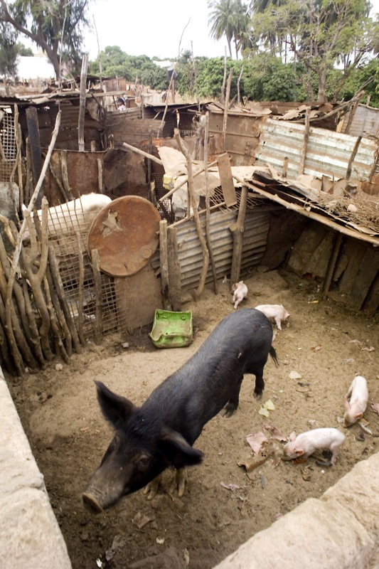 Elevage de cochons à Mboro, Sénégal